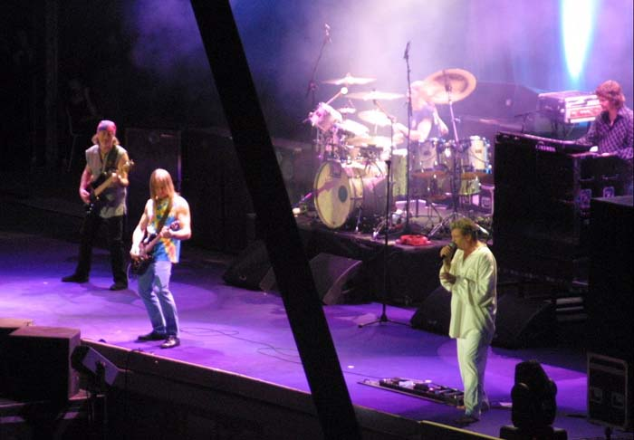 Deep Purple in Berlin, 2003.